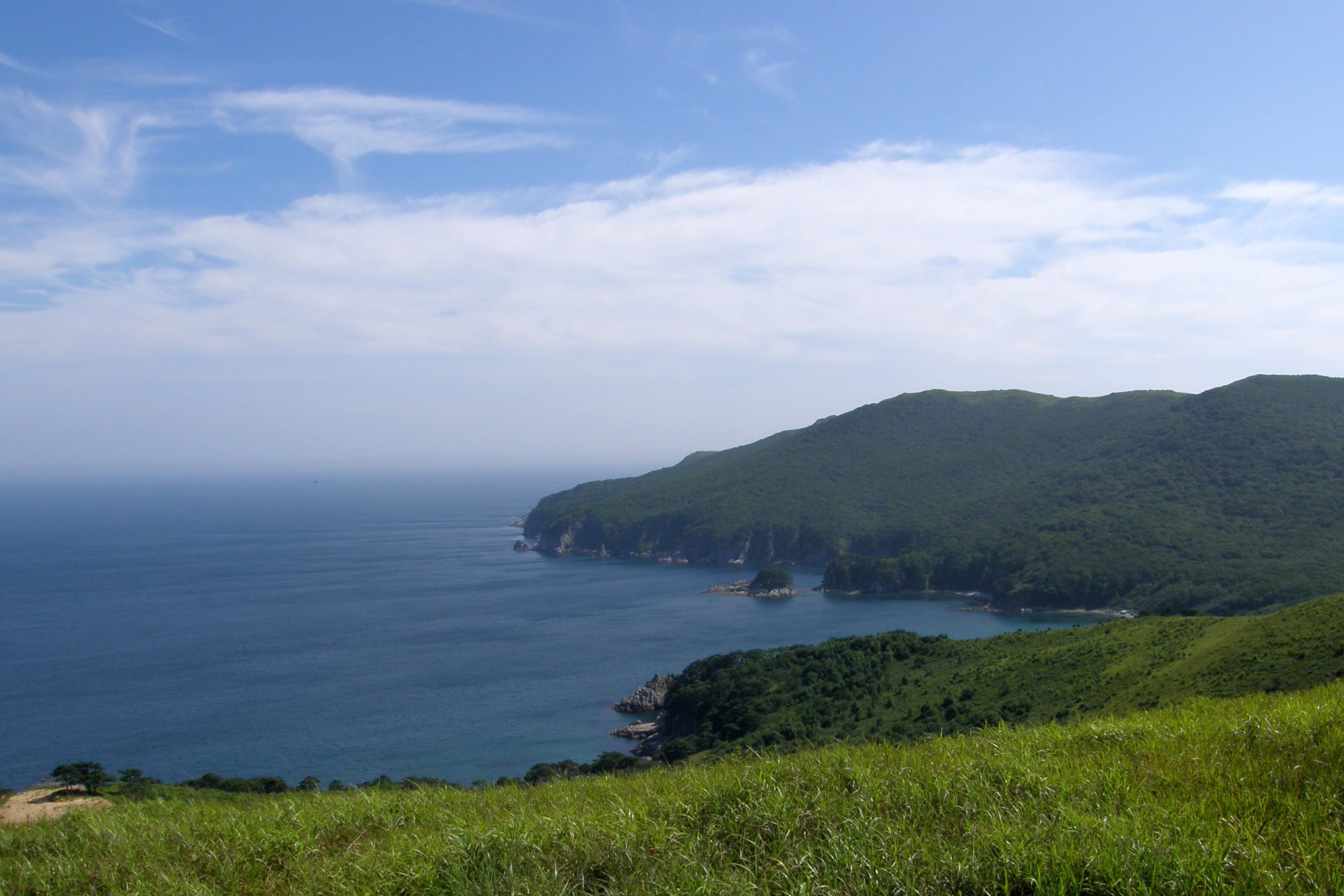 Бухта Теляковского — небольшой залив у западного берега Японского моря между мысом Гамова и мысом Теляковского.